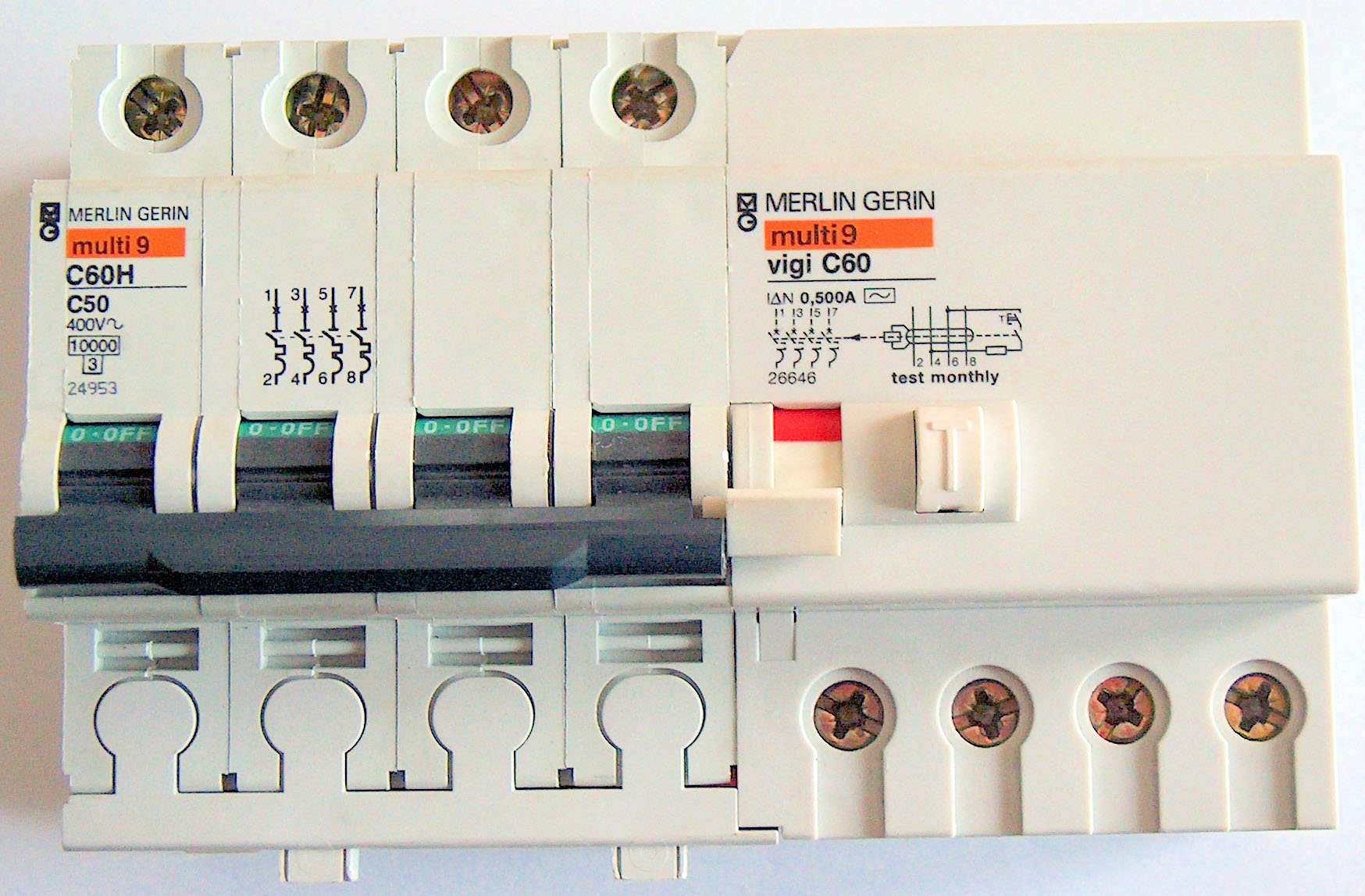 Interruttore magnetotermico con differenziale incorporato 3 fasi + neutro